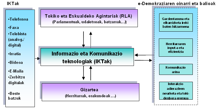 E-demokraziaren irudikapen grafikoa.